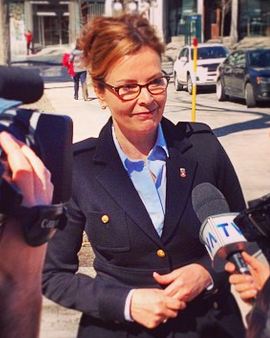 Anne Guérette lors d'une entrevue à un réseau de télévision populaire en 2015.